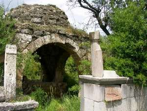 Bahçe, Osmaniye'den bir görünüm.